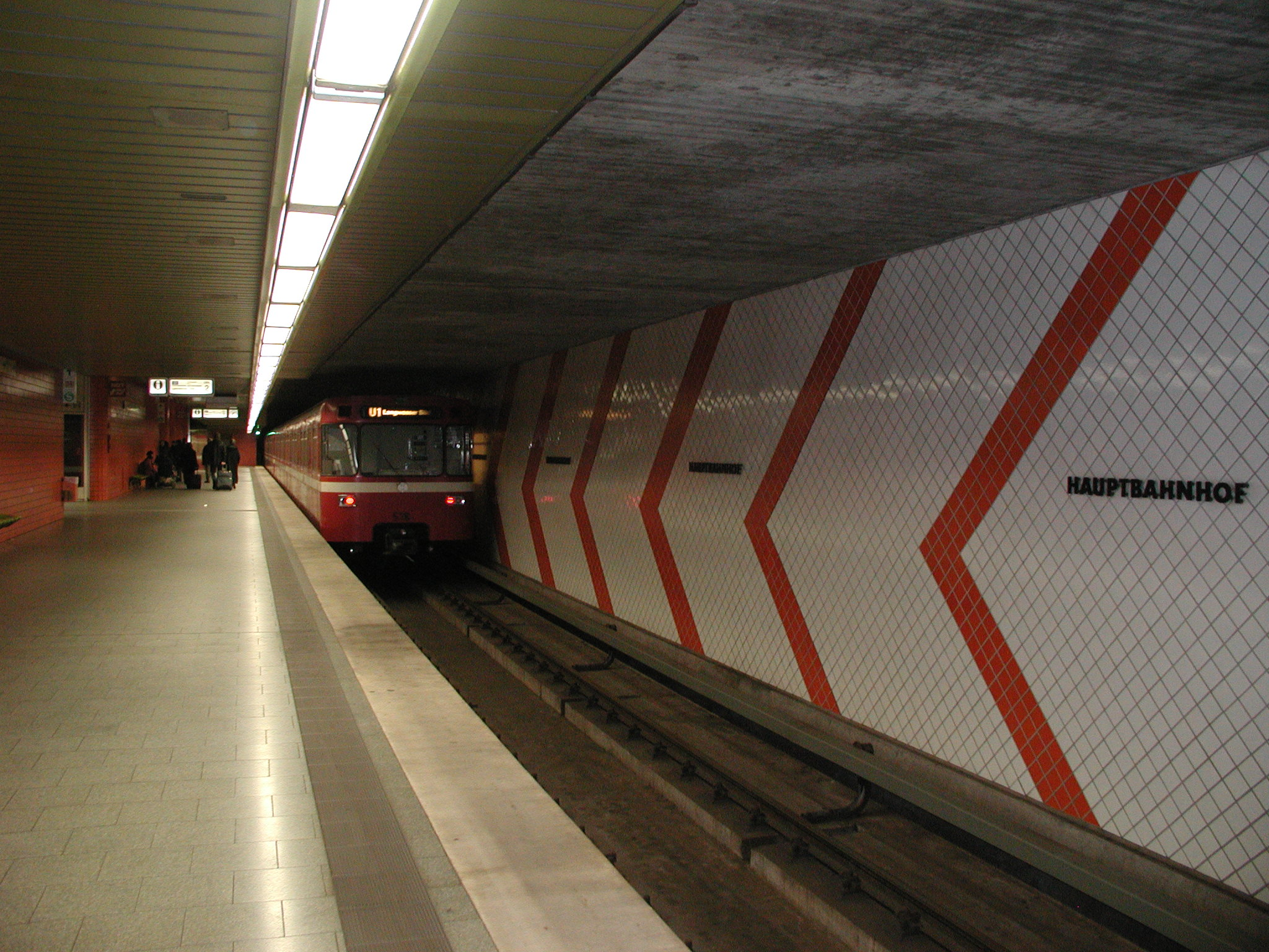 U-Bahnhof Nürnberg Hauptbahnhof (U1)